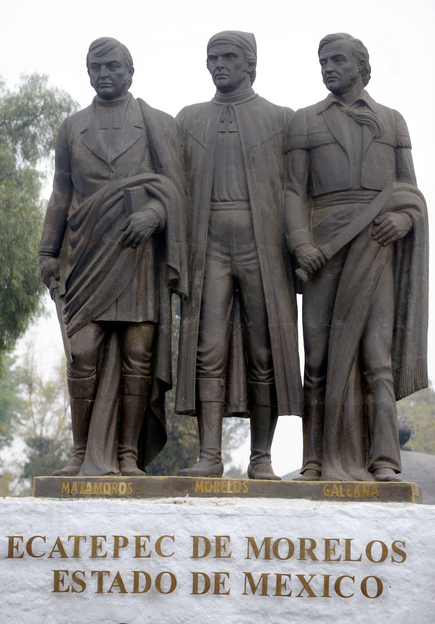 Monumento a Mariano Matamoros, José María Morelos y Hermenegildo Galeana en el Parque San Cristóbal Ecatepec.